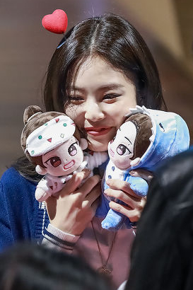 Jennie Kim no fansign de SOLO em Gangnam Shinsegae, em 16 de dezembro de 2018